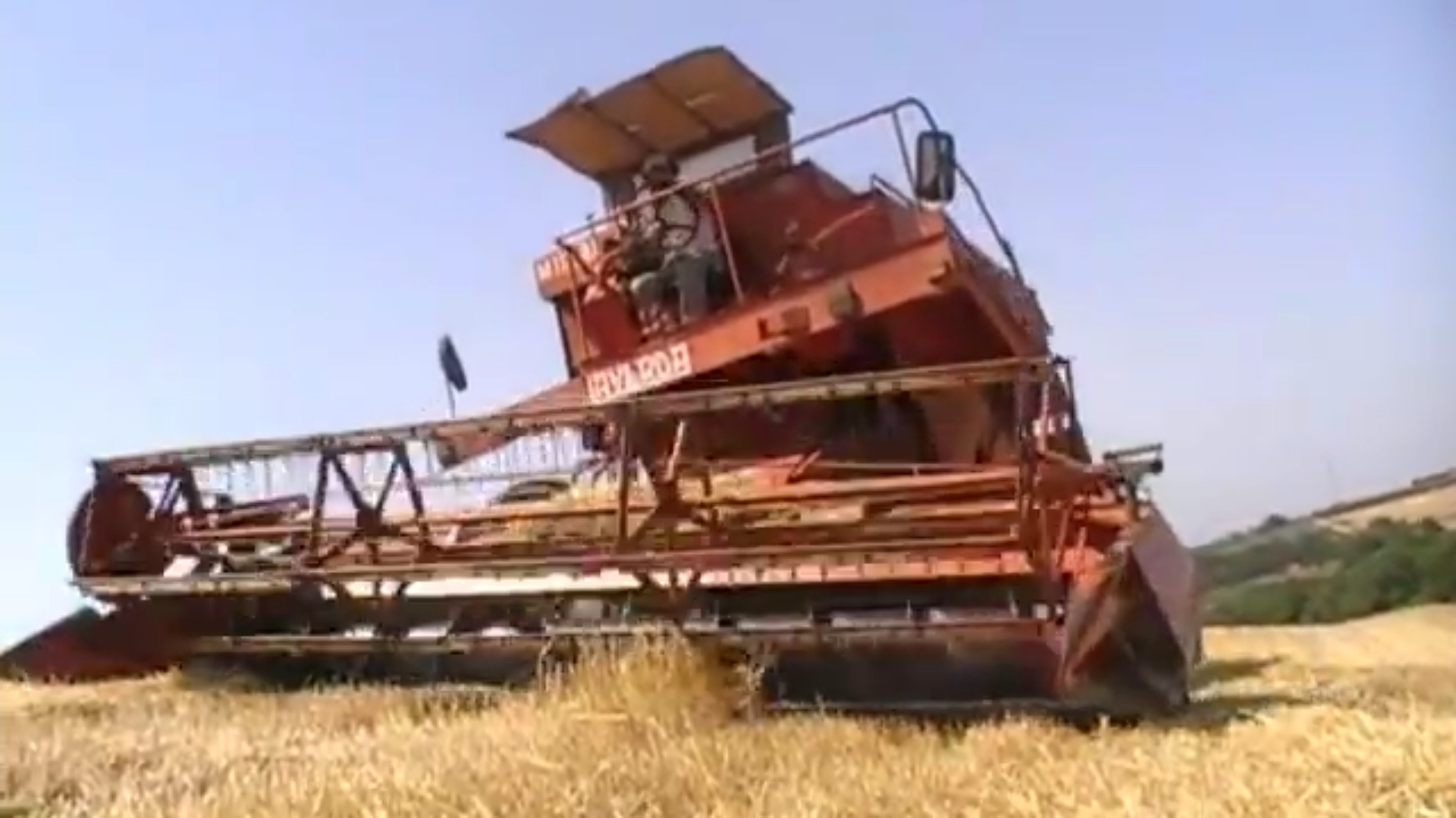 Work in the nature